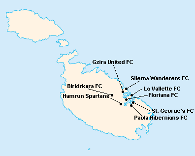 Répartition des clubs en First Division Maltaise 1968-1969.